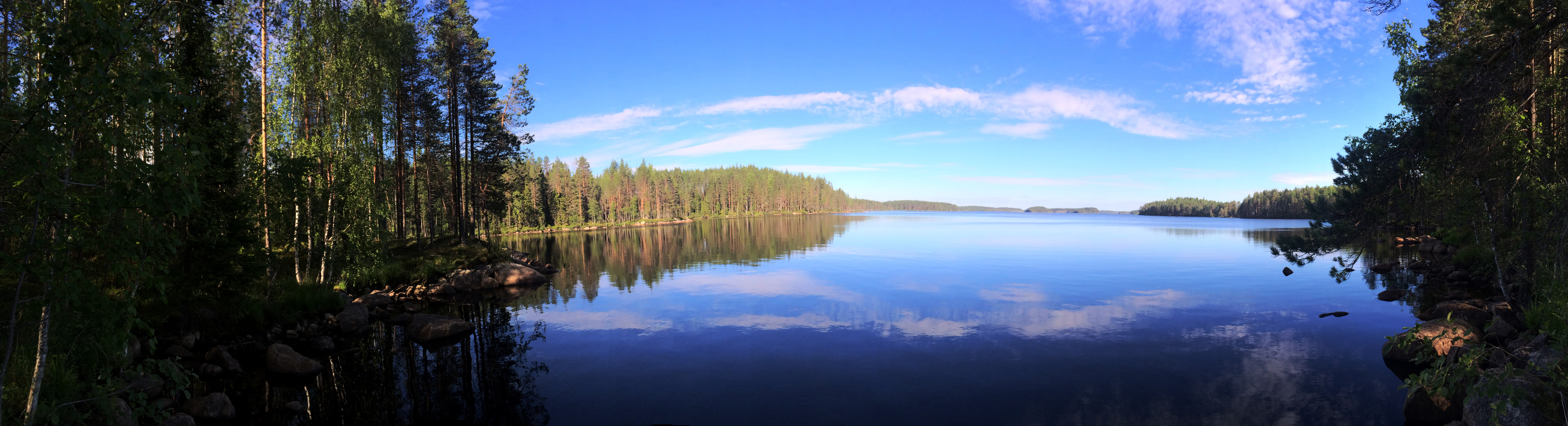 Ягляярви